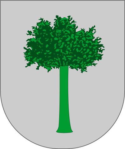 Herniakde herriko armarria